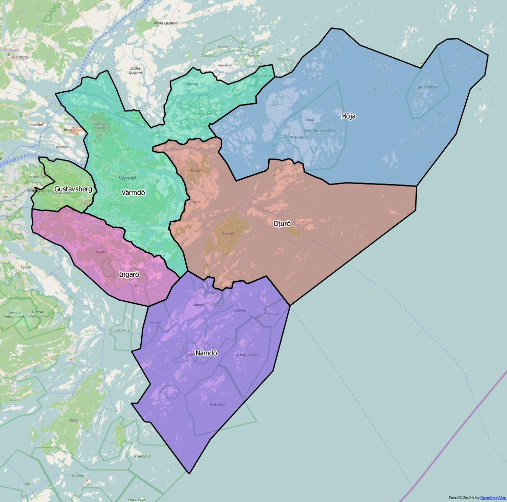 Distriktsindelningen i Värmdö kommun World file 124.09733787233980706 0 0 -124.09733787233980706 2031516.06547393440268934 8299742.6806481871753931